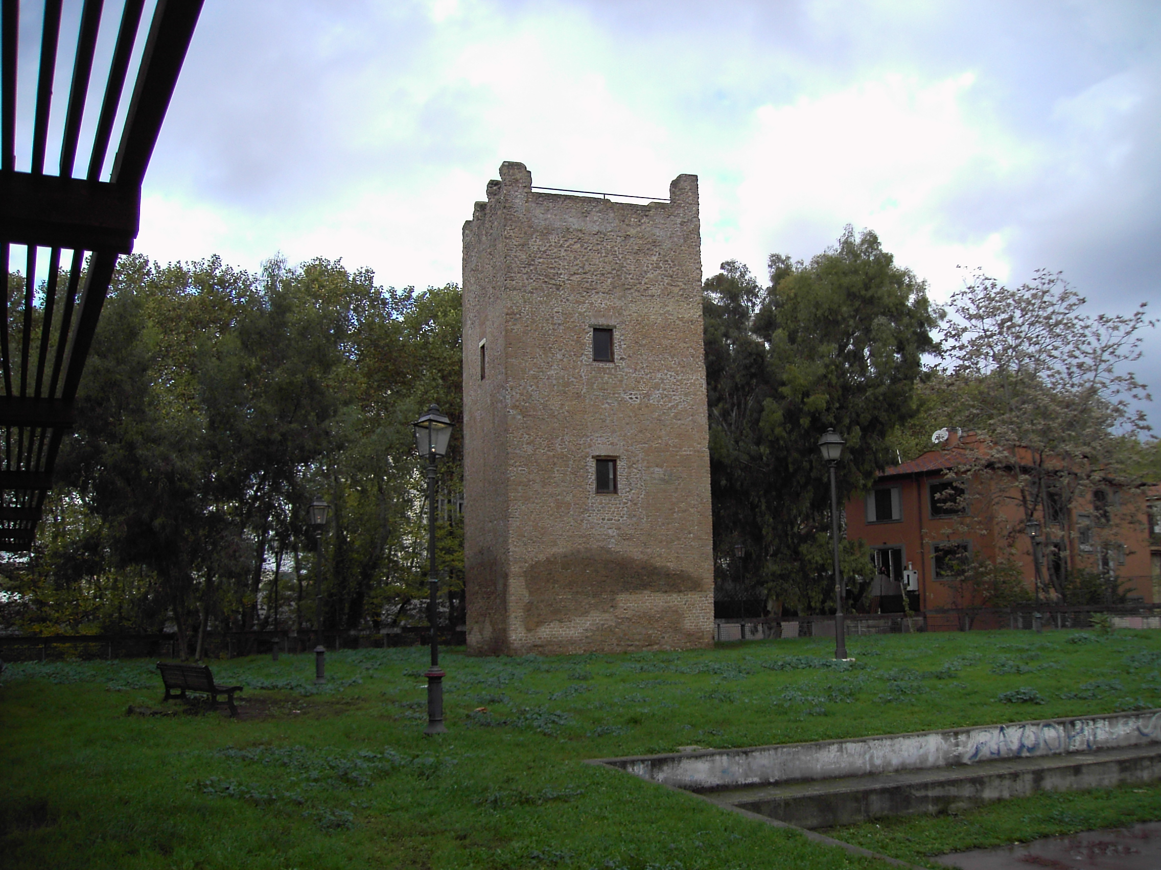 Roma, Tormarancio, la torre di Amaranthus